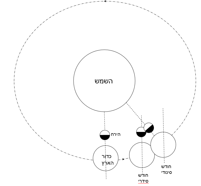 תיאור מיקום הירח ביחס לכדור הארץ וביחס לשמש לאחר חודש סידרי ולאחר חודש סינודי